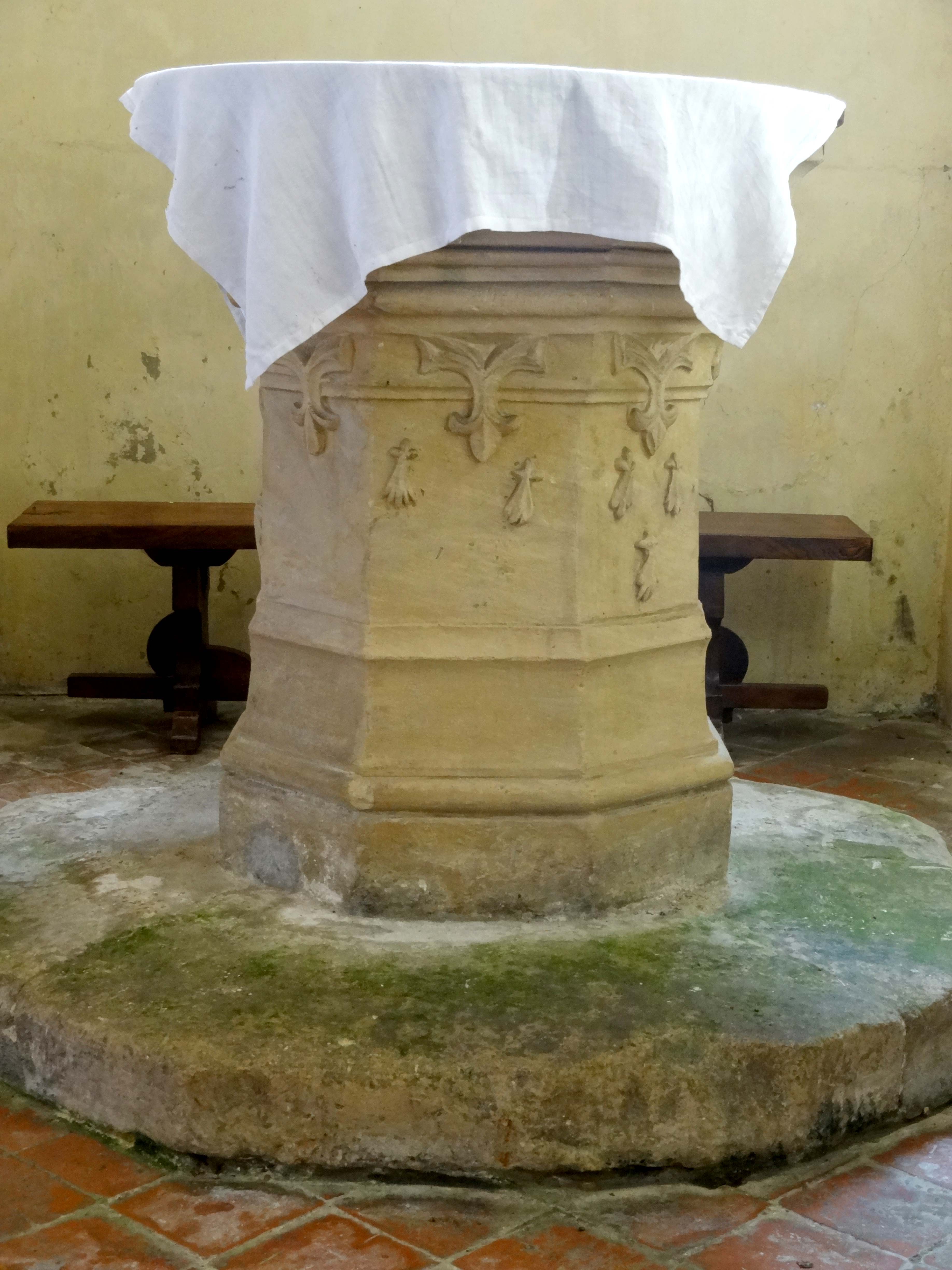 Fonts baptismaux.